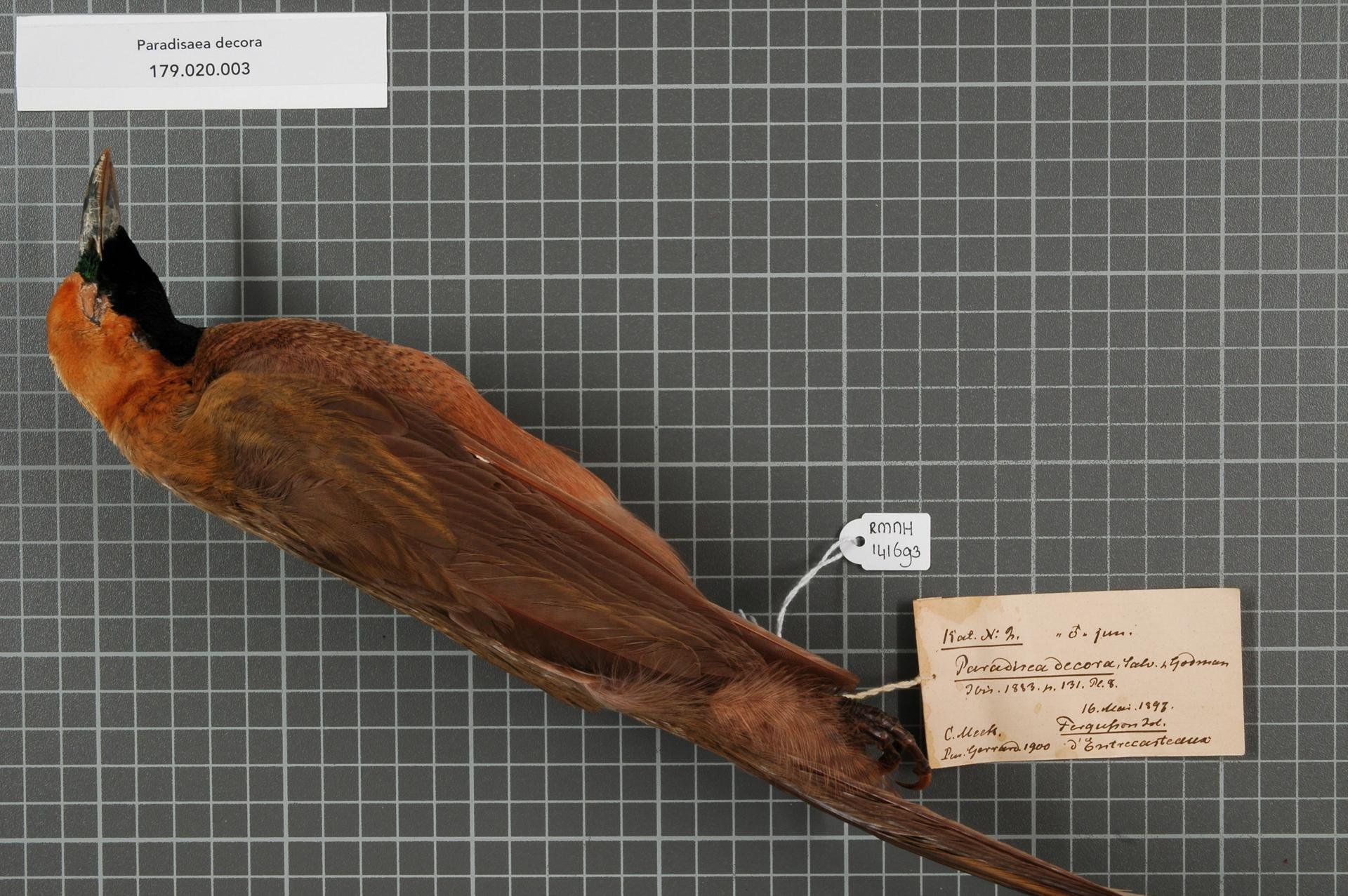 Paradisaea decora Salvin and Godman, 1883